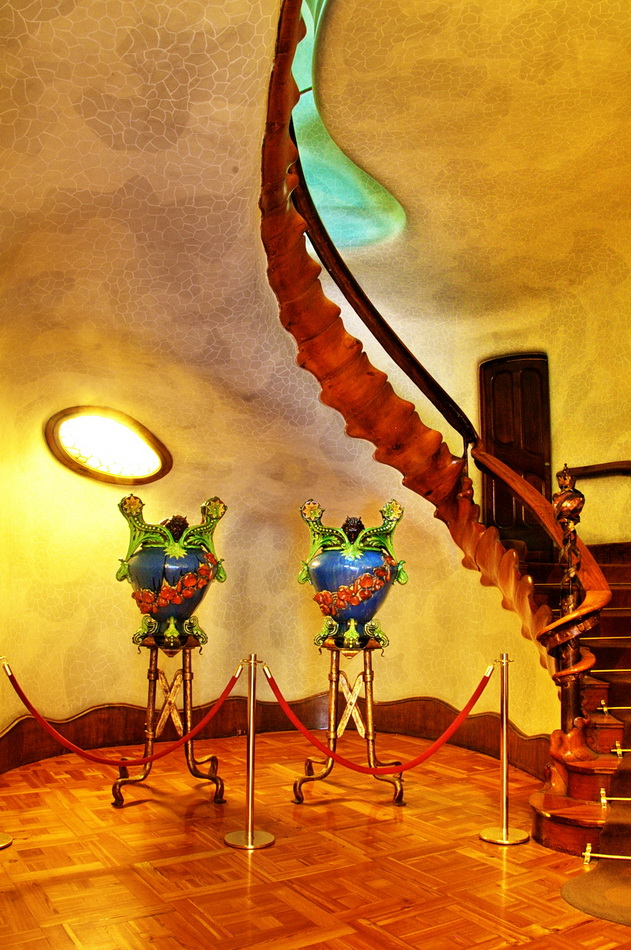 Escala d'accés al pis noble de la casa Batlló (1904-1906), obra d'Antoni Gaudí, (Barcelona, Catalunya). El disseny simula l'espinada d'un animal prehistòric.